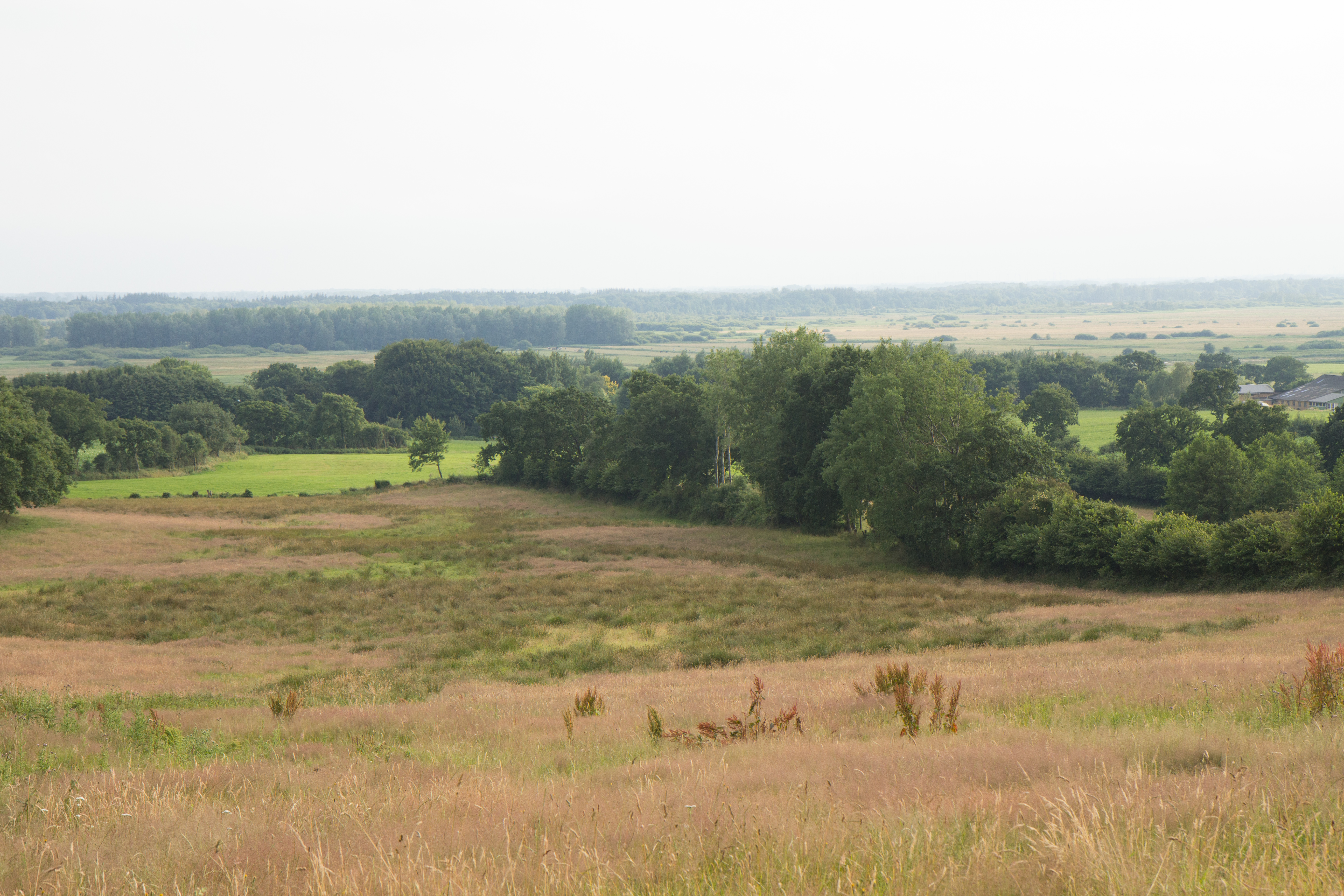 Blick vom Glockenberg in die Landschaft bei Hude